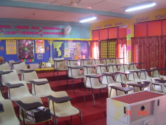 Bilik Tayangan SK Sena